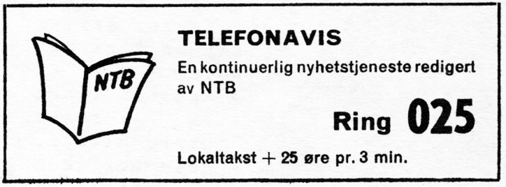 Telefonavisen annonse